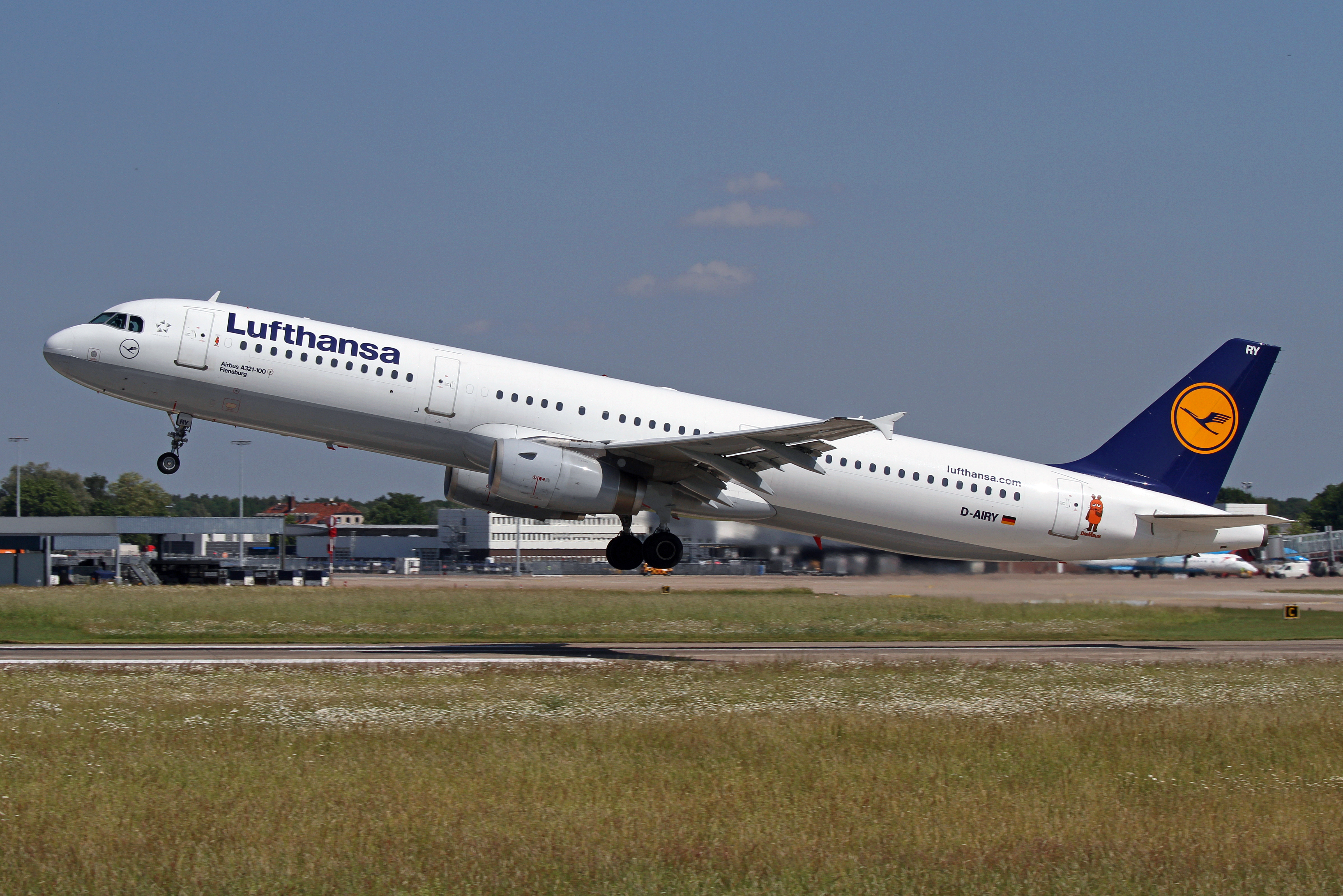 D-AIRY "DIE MAUS" THE MOUSE